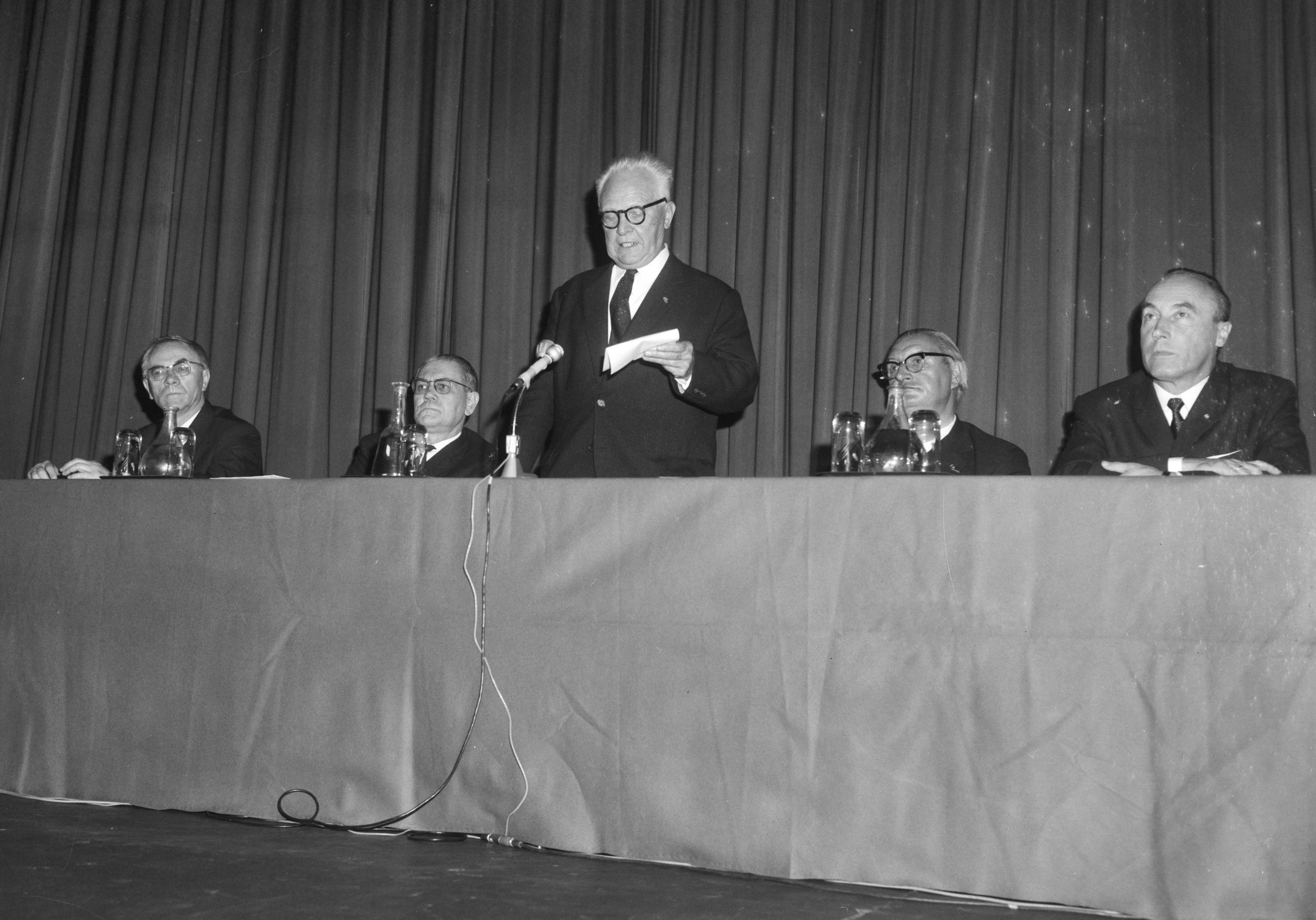 Uitreiking van de Grote Prijs der Nederlandse Letteren aan dichter J.C. Bloem (1887-1966) in het Residence Palace te Brussel. Toespraak tijdens de prijsuitreiking, door Julien C. Kuypers. V.l.n.r: Karel Jonckheere, minister A. de Clerck, Julien Kuypers, Anton van Duinkerken (vertegenw. van J.C. Bloem), dhr. X (Jan Willem Schulte Nordholt?). Datum: 8 oktober 1965